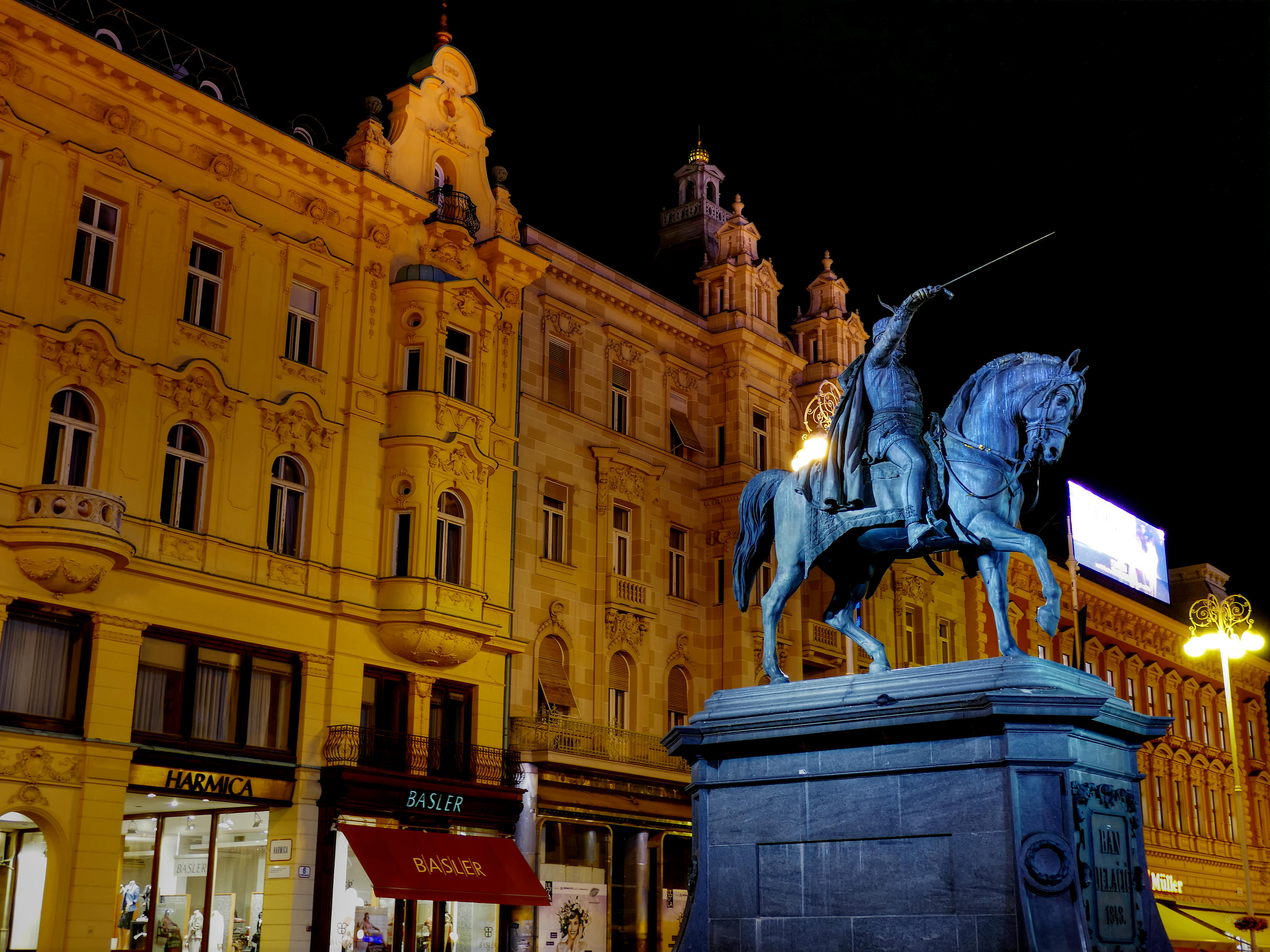 Beschreibung: Siehe Link 1+2+3